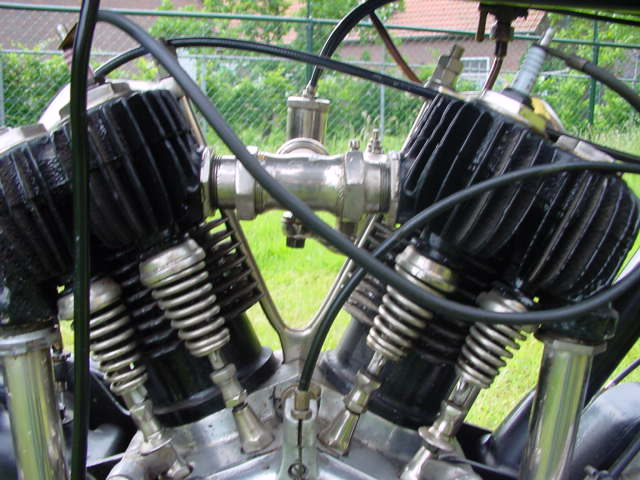 Motore SV.